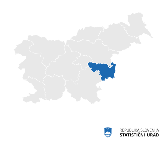 regije